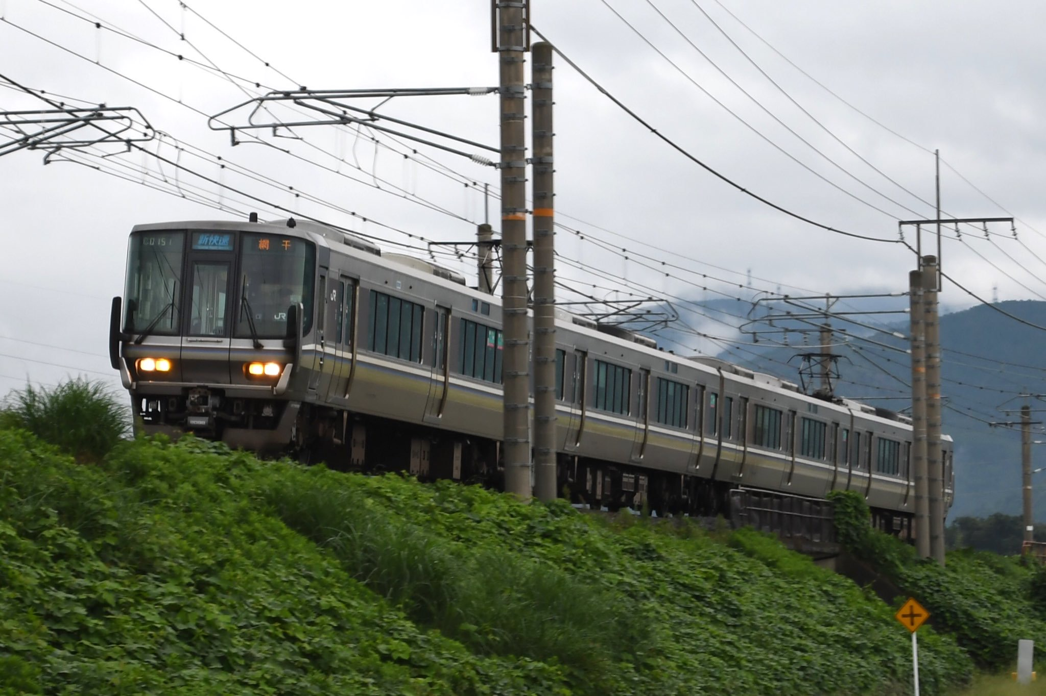 JR西日本223系2000番台V10編成 JR湖西線近江中庄〜マキノ